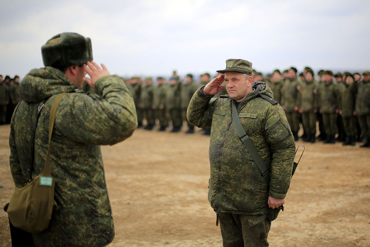 Михаил Яковлевич Носулев на завершении проверки боевой готовности ставропольского общевойскового соединения ЮВО (Ростовская обл.).